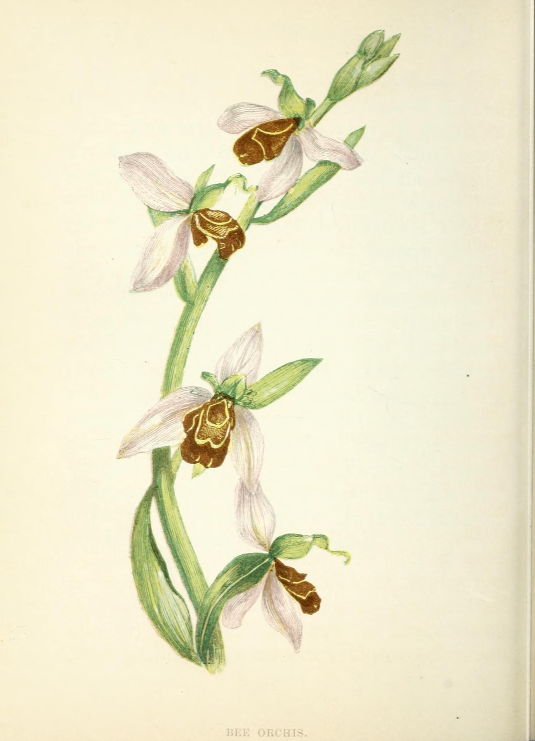 BEE ORCHID